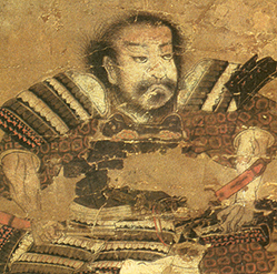 Portrait de Katsuie Shibata, commandant samouraï